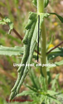 copiado de Fotografía digital realizada por Pablo Alberto Salguero Quiles.